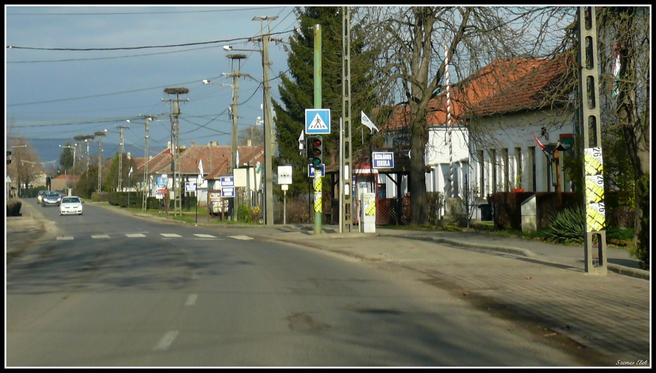 Bodrogkeresztúr, 3916 Hungary